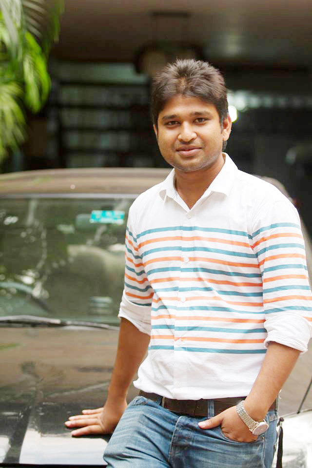 এস এম নাজমুল হক ইমন